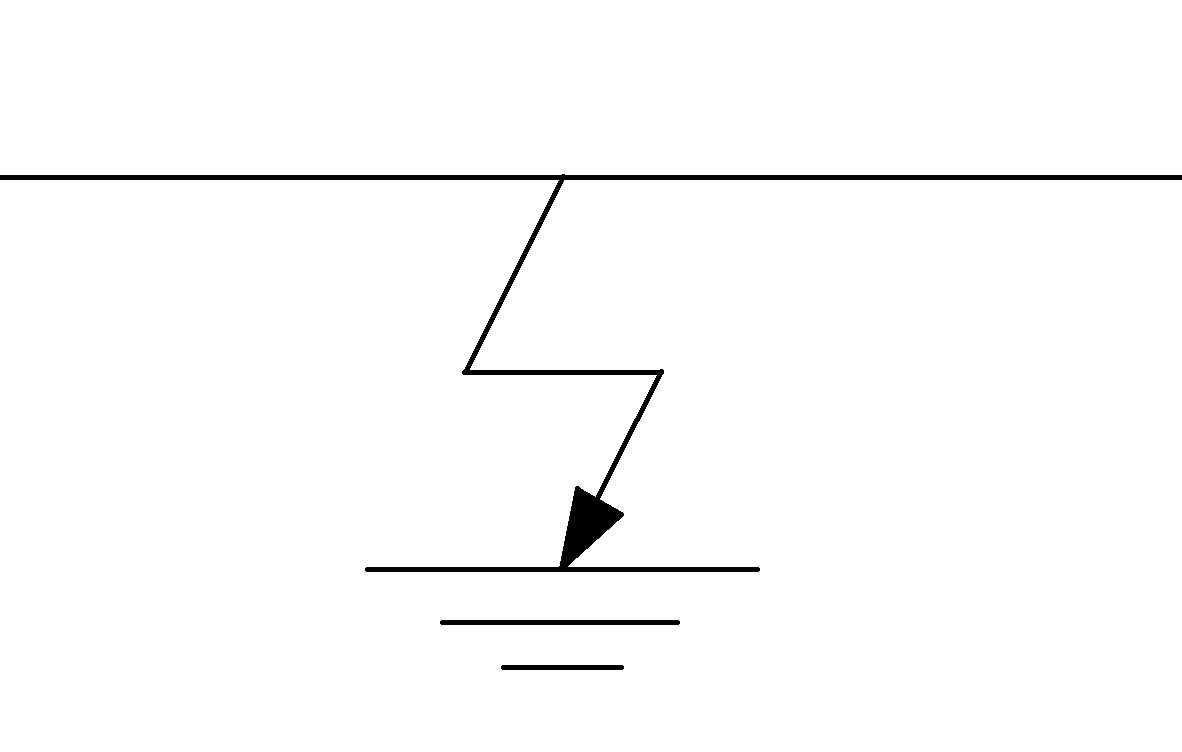 Isolatsioonirike juhtme ja maanduse vahel